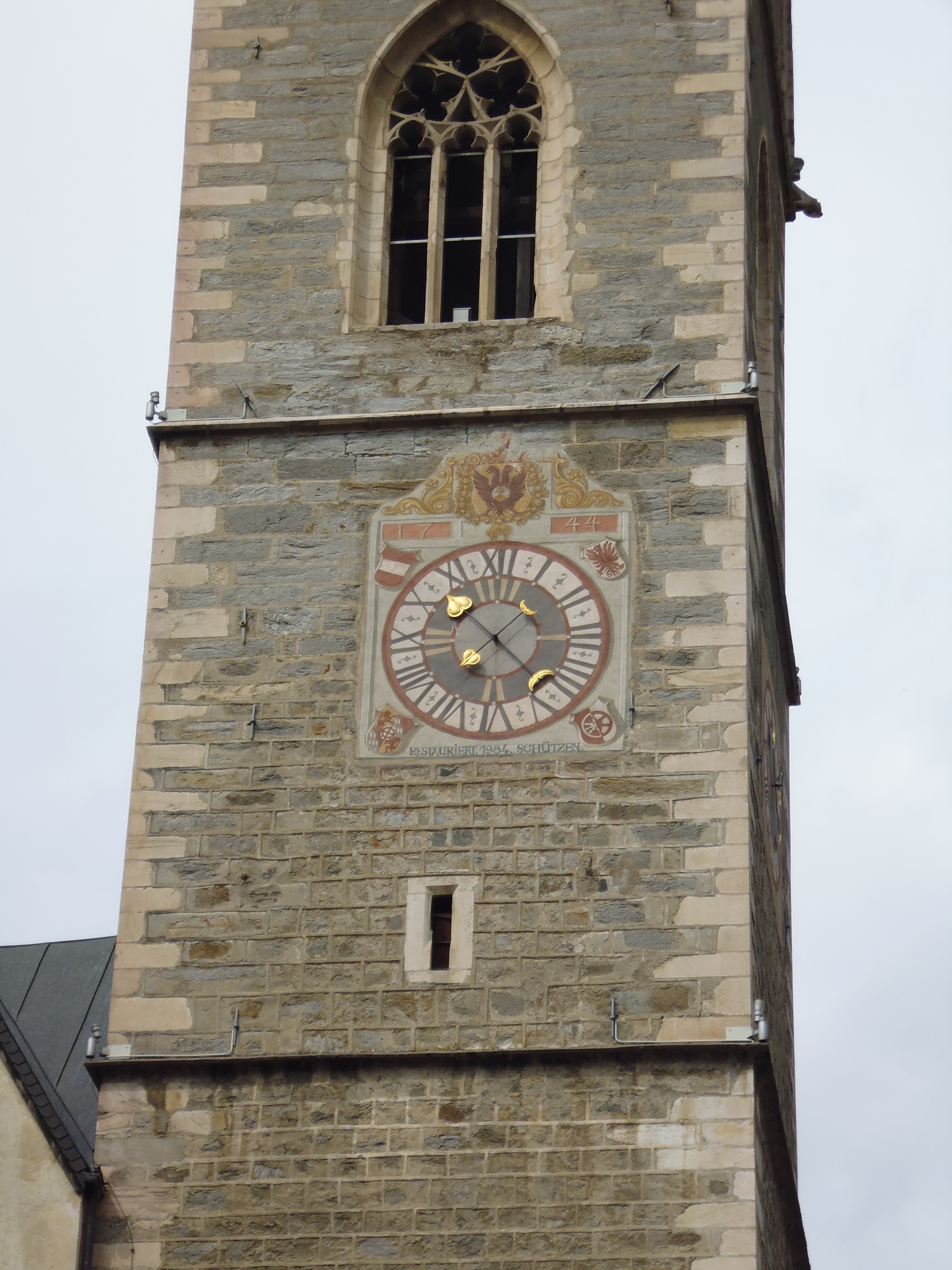 Außendetails der Pfarrkirche Maria Himmelfahrt (Schlanders)